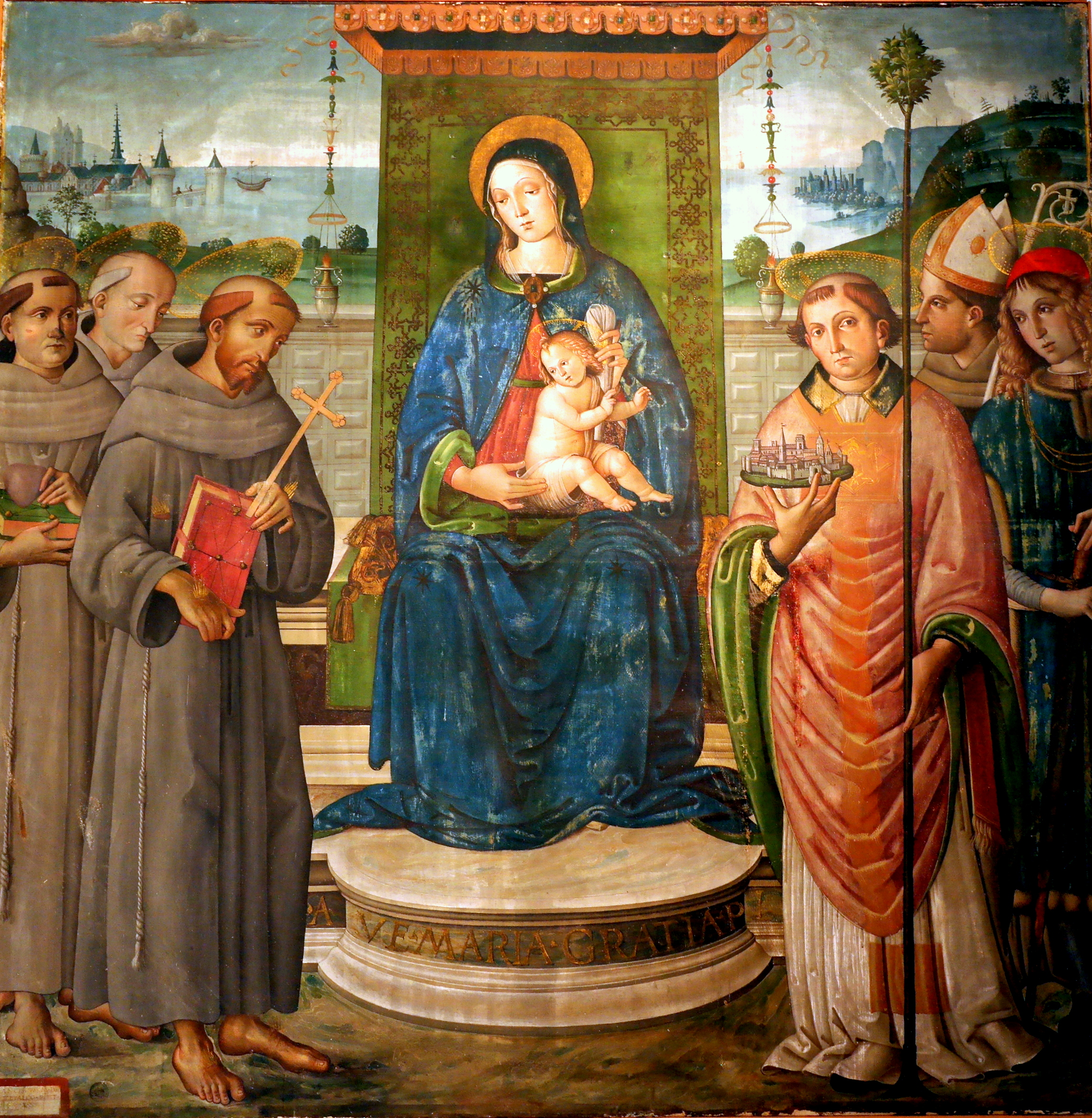 Madonna con Bambino di Francesco Melanzio, conservato nella Pinacoteca del Complesso museale di San Francesco a Montefalco